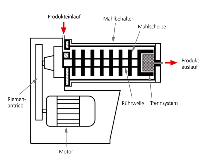 Aufbau und Prinzip von Rührwerkskugelmühlen